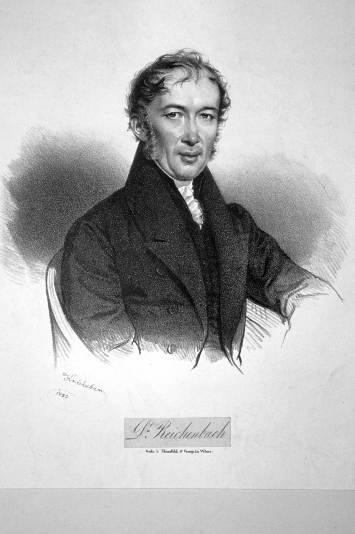 Karl von Reichenbach (1788-1869) deutscher Chemiker und Erfinder.